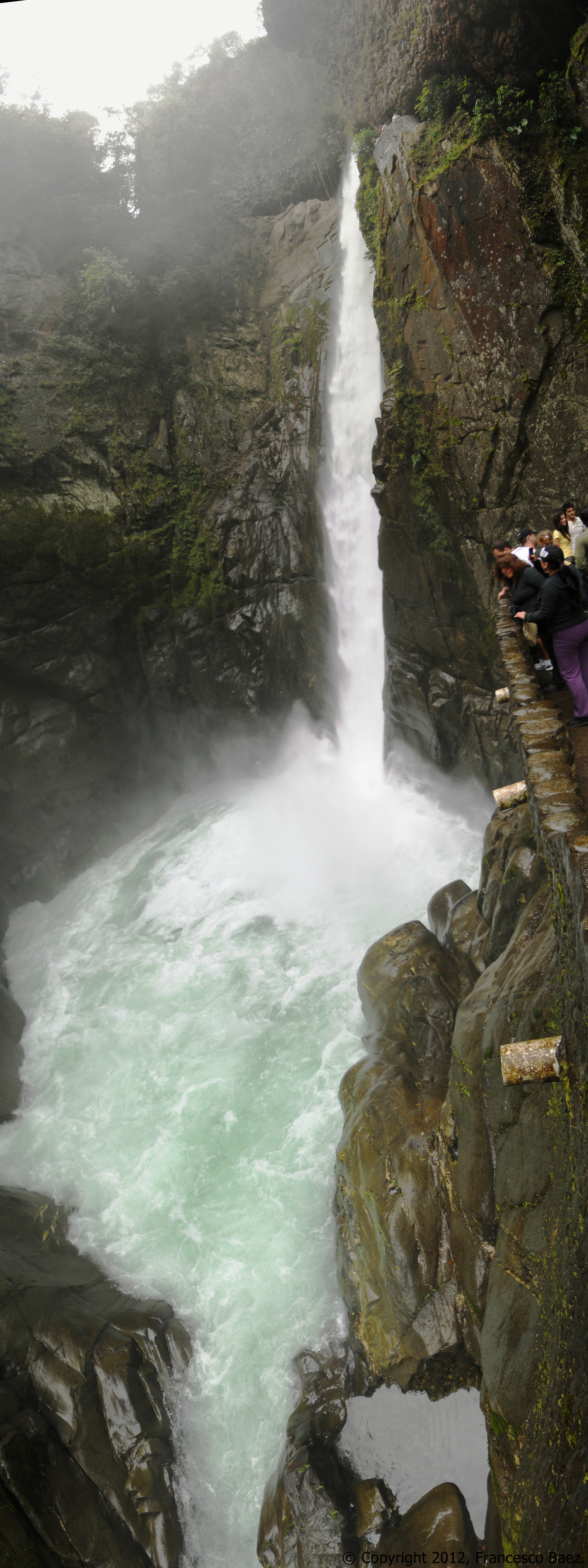 Pailón del Diablo